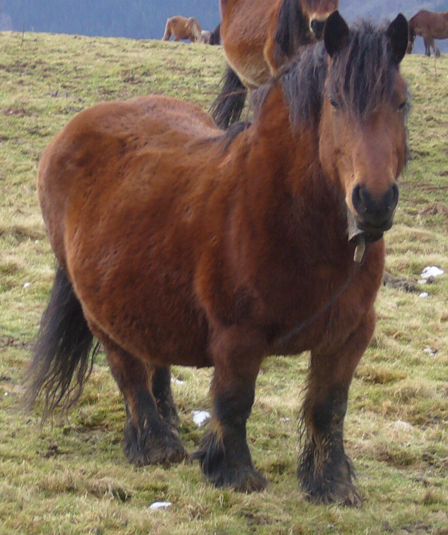 Détail sur un cheval Basque des montagnes de modèle très lourd